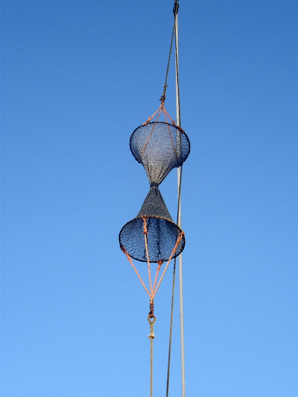 Signalkörper, Schiff nur beschränkt manövrierbar